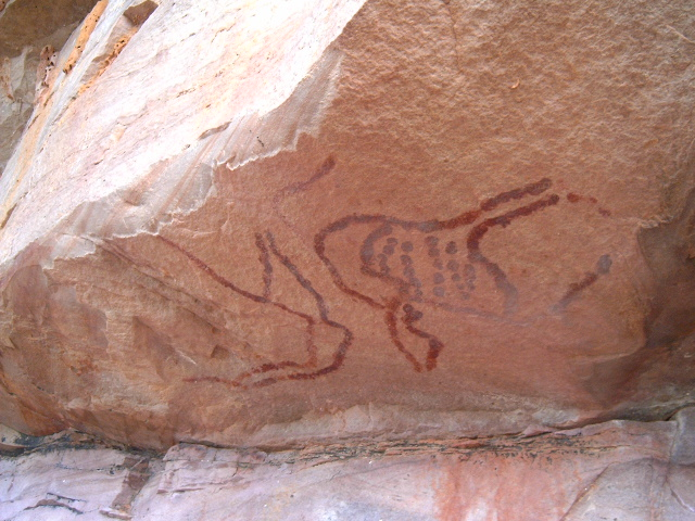 Pinturas rupestres en la vereda "Chimitá", de Betulia, Santander, Colombia Imagen propia (del autor) tomada en julio de 2004, que no viola ninguna política de copyright